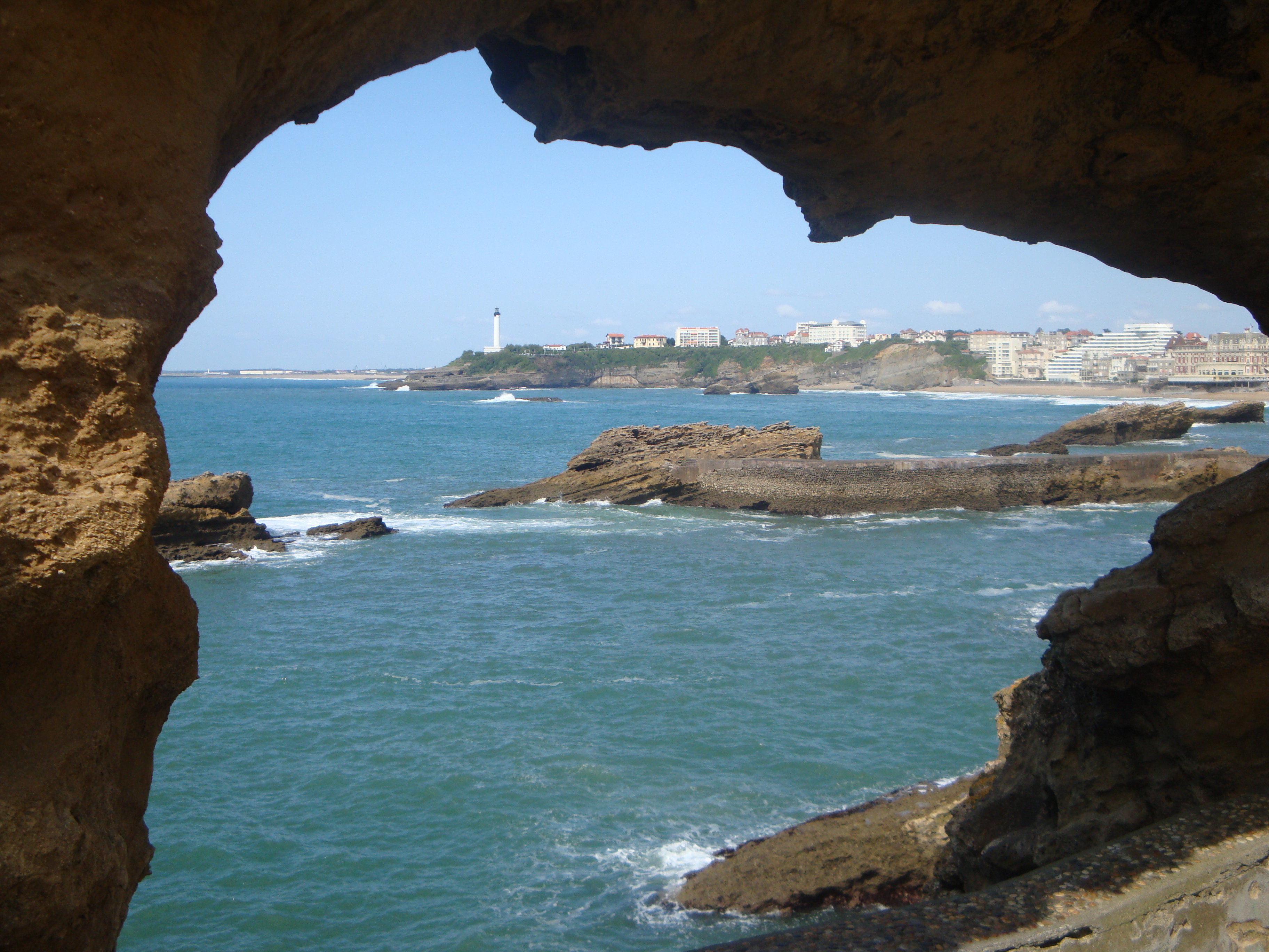 Vista de Biarritz (Francia)